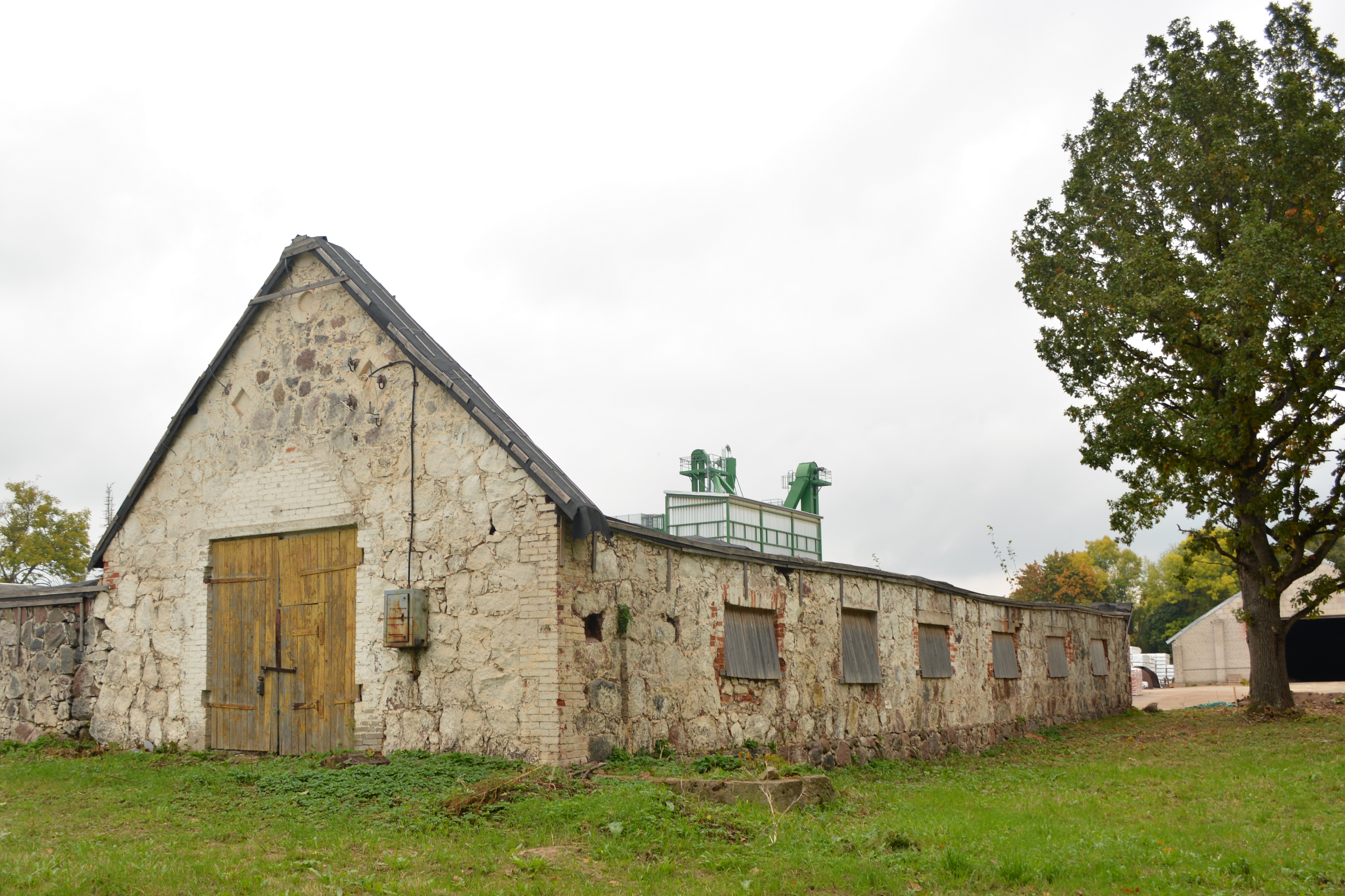 Kavastu mõisa tall